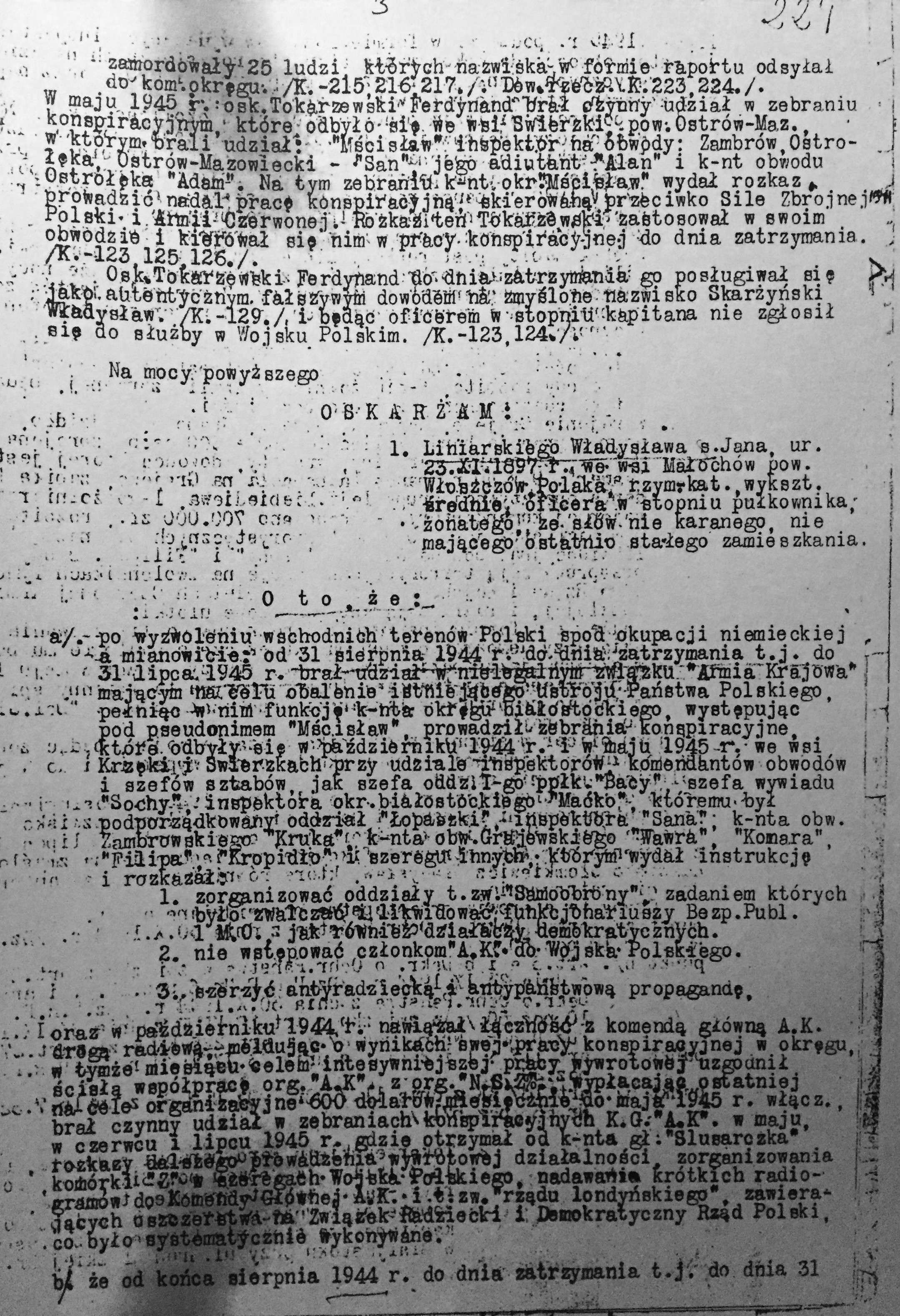 Jedna ze stron aktu oskarżenia przeciw Władysławowi Liniarskiemu